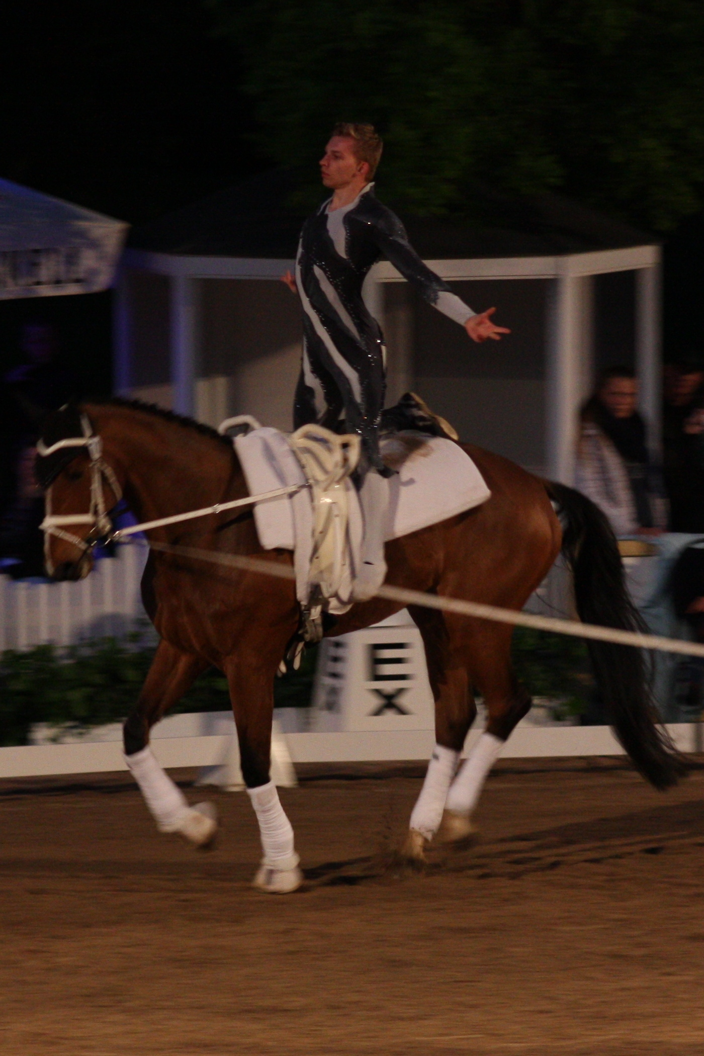 77. Internationales Pfingstturnier Wiesbaden 2013, CVI *** Voltigieren, Torben Jacobs mit Flash Back Personality rights warning Although this work is freely licensed or in the public domain, the person(s) shown may have rights that legally restrict certain re-uses unless those depicted consent to such uses. In these cases, a model release or other evidence of consent could protect you from infringement claims.